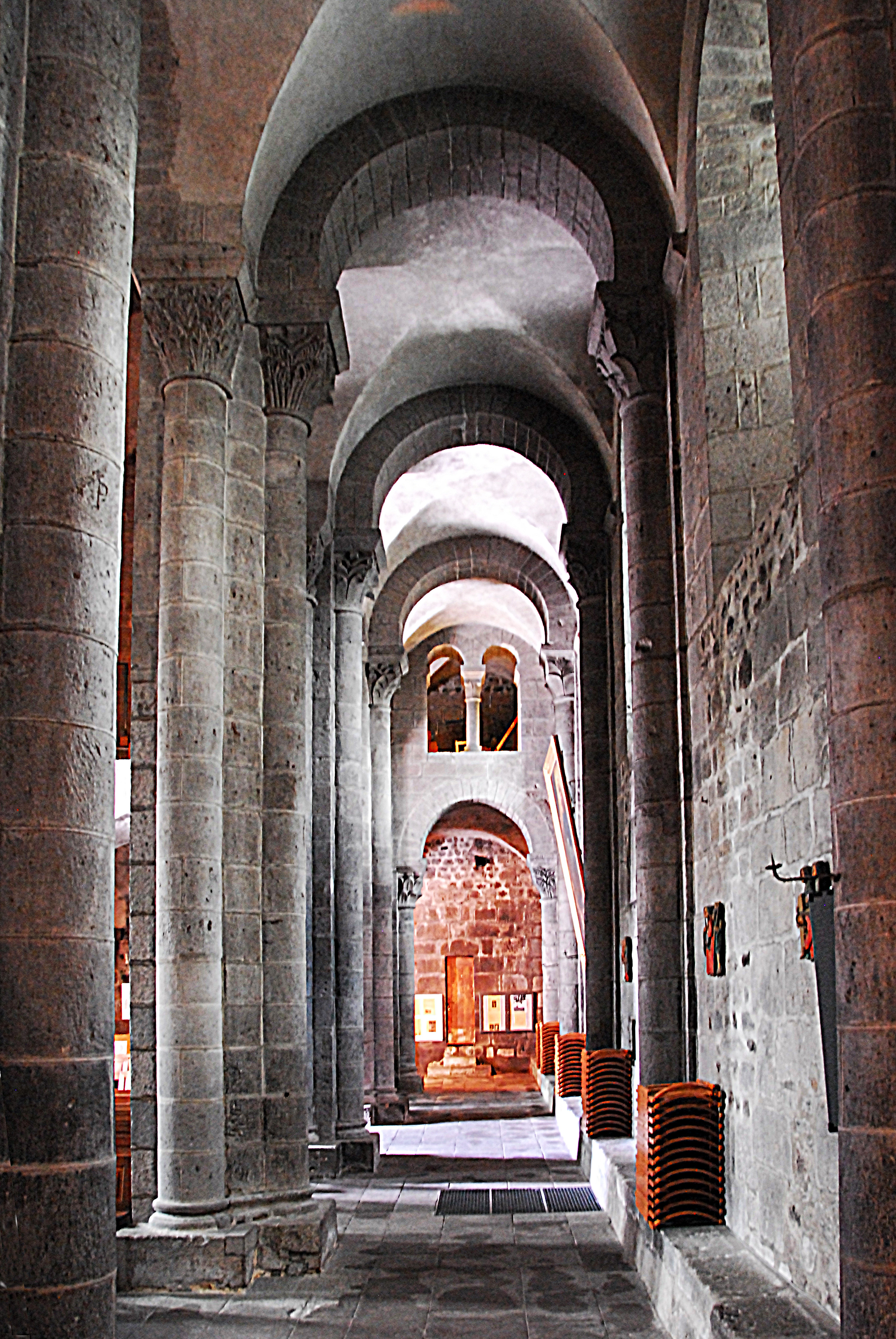 N.-D. d'Orcival, nördl. Seitenschiff n. hinten